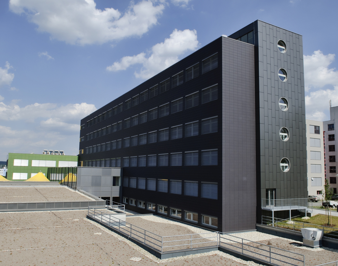 Fakulta elektrotechniky a komunikačních technologií